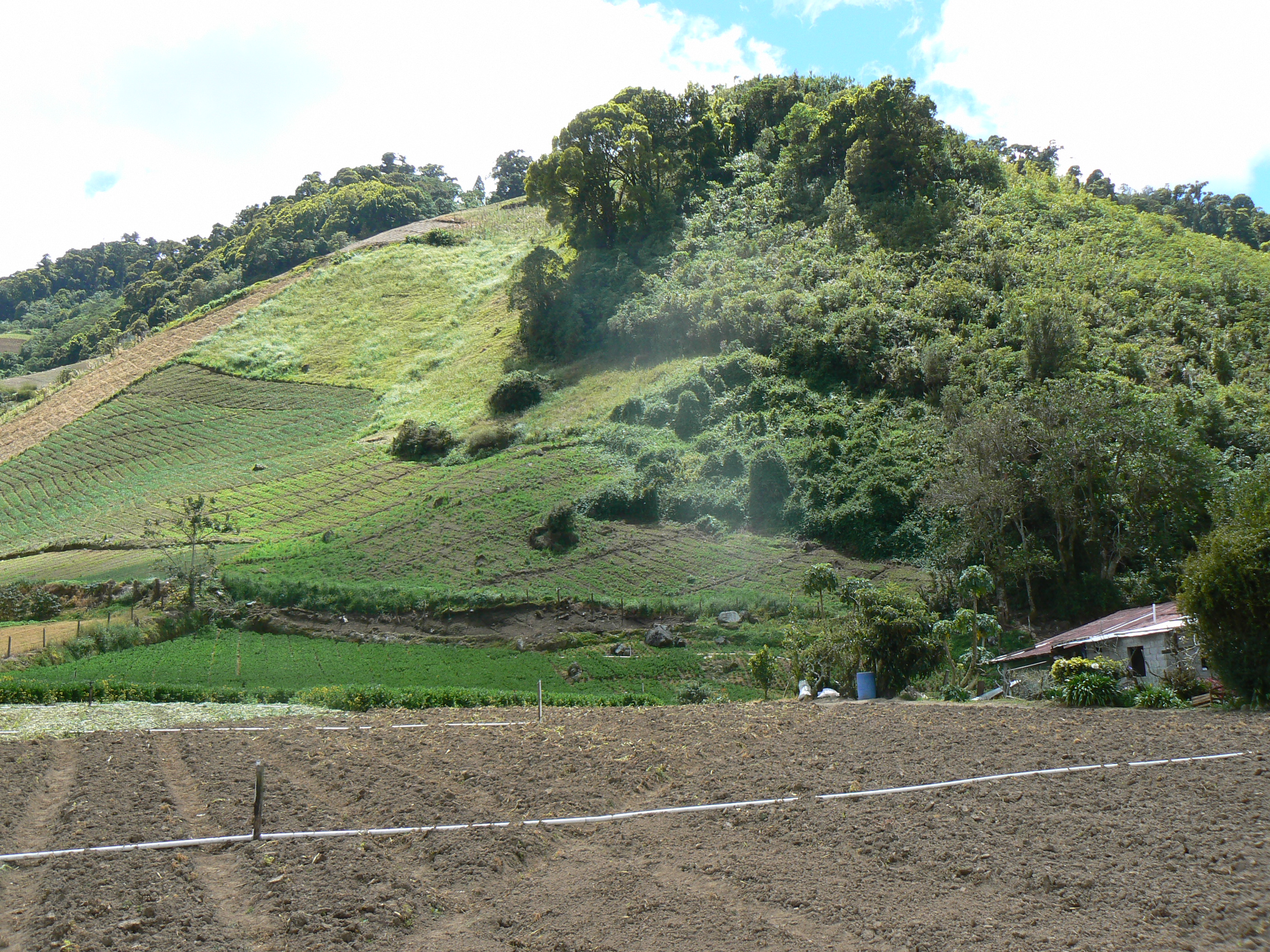 Cultivos en proximidades de Guadalupe, Cerro Punta.